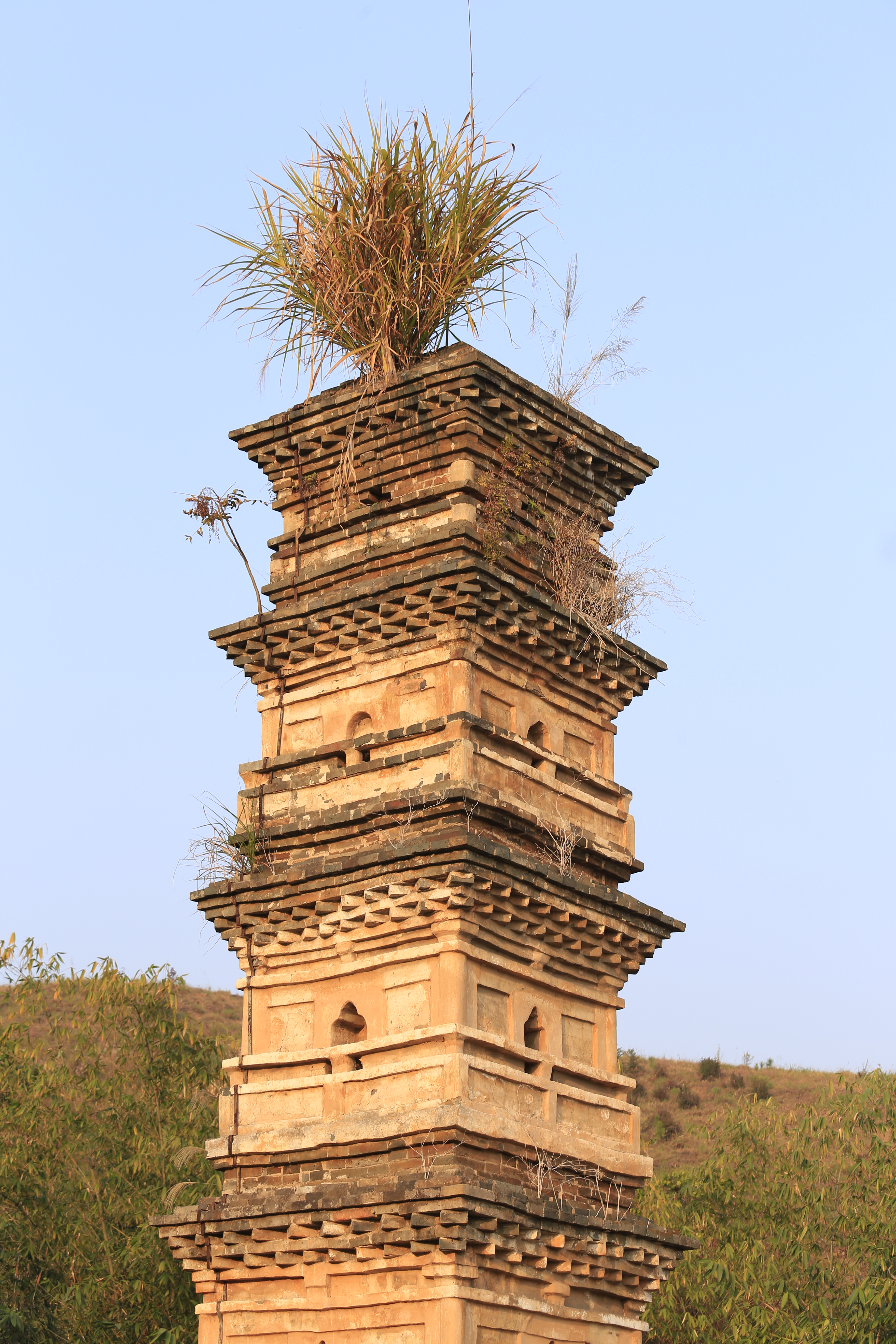 仁化县云龙寺塔